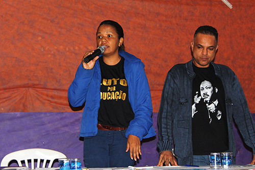 Denise de Paula Romano e José Luiz Rodrigues